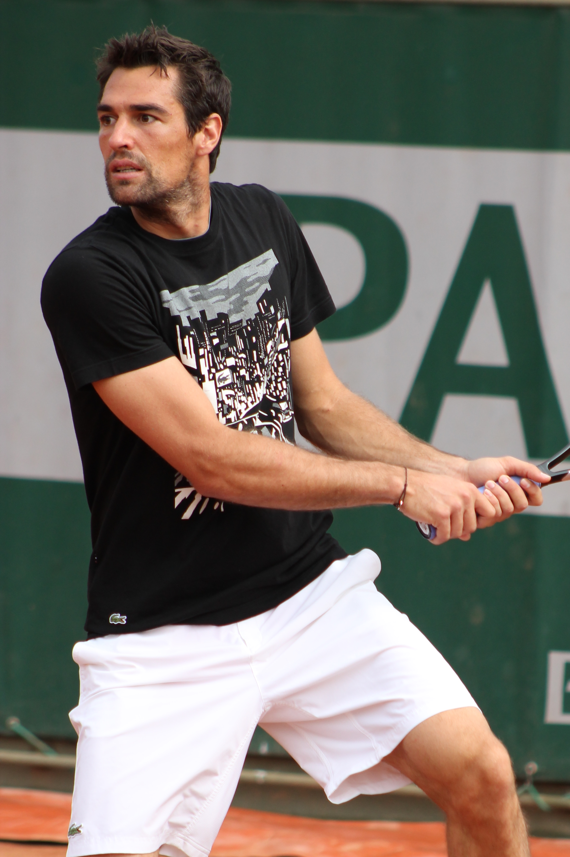 Chardy RG15 (5)